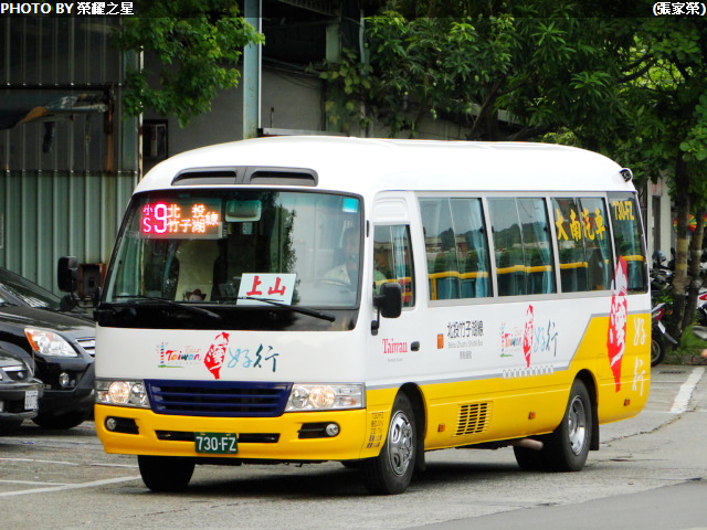 中文（台灣）: 大南汽車豐田Coaster中型巴士730-FZ，台灣好行塗裝，行駛臺北市聯營公車小9線。